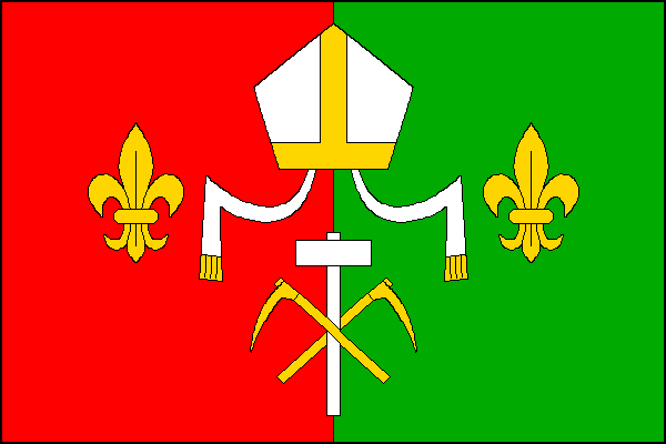 vlajka, Maletín, okres Šumperk